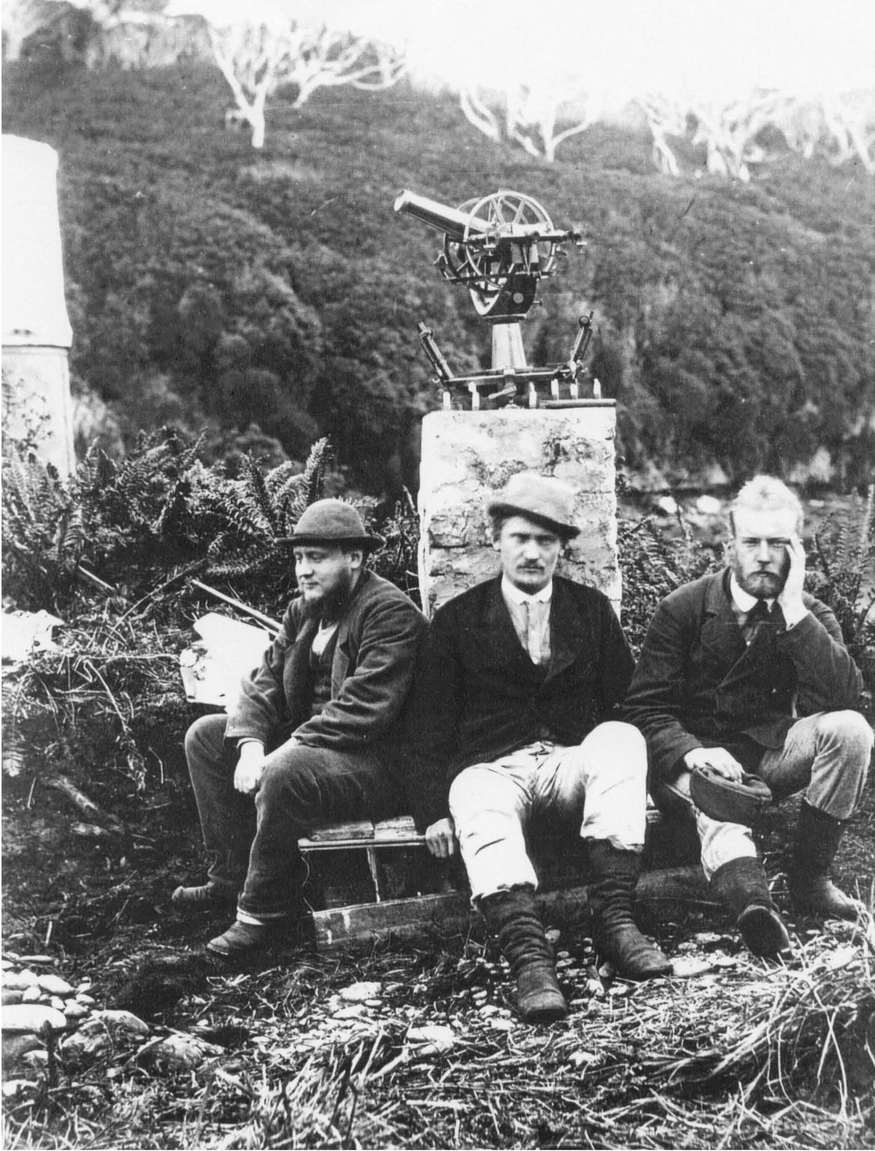 Terror Cove, Port Ross,[1] Station der deutschen Expedition III zur Beobachtung des Venusdurchgangs 1874. Von links: Hugo von Seeliger (Expeditionsleiter), Hermann Leyser (Mechaniker), Kapitänleutnant W. J. Becks (Kaiserliche Marine). Dahinter: Steinpfeiler mit Heliometer.